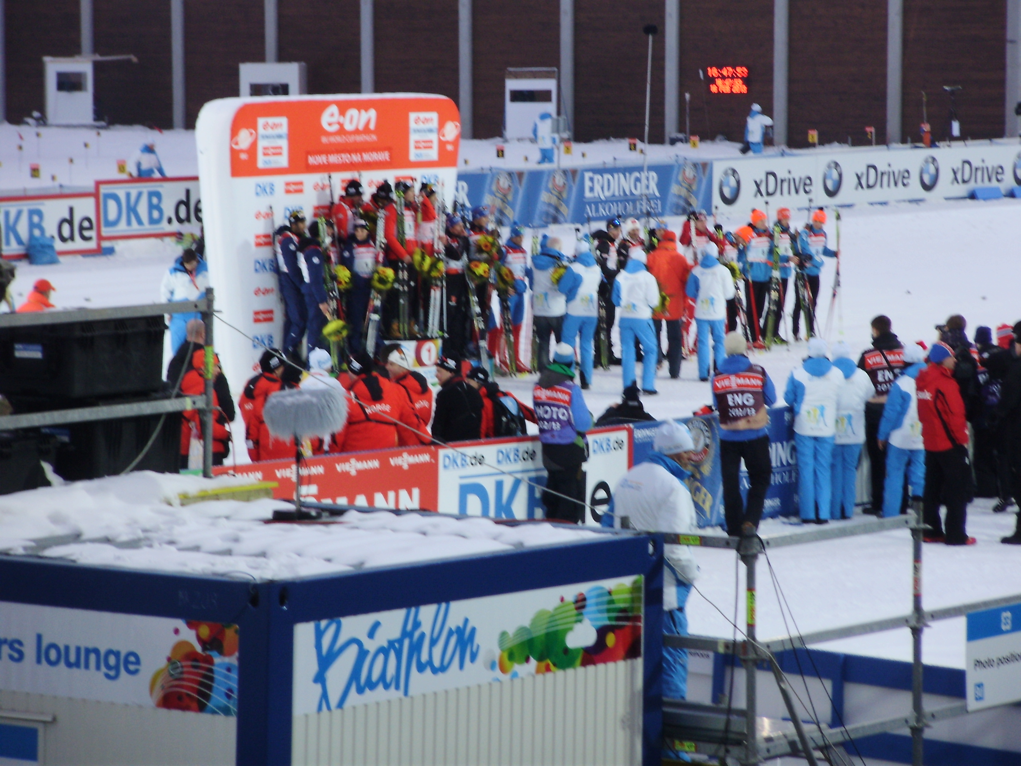 MS v Biatlonu 2013 - štafety muži